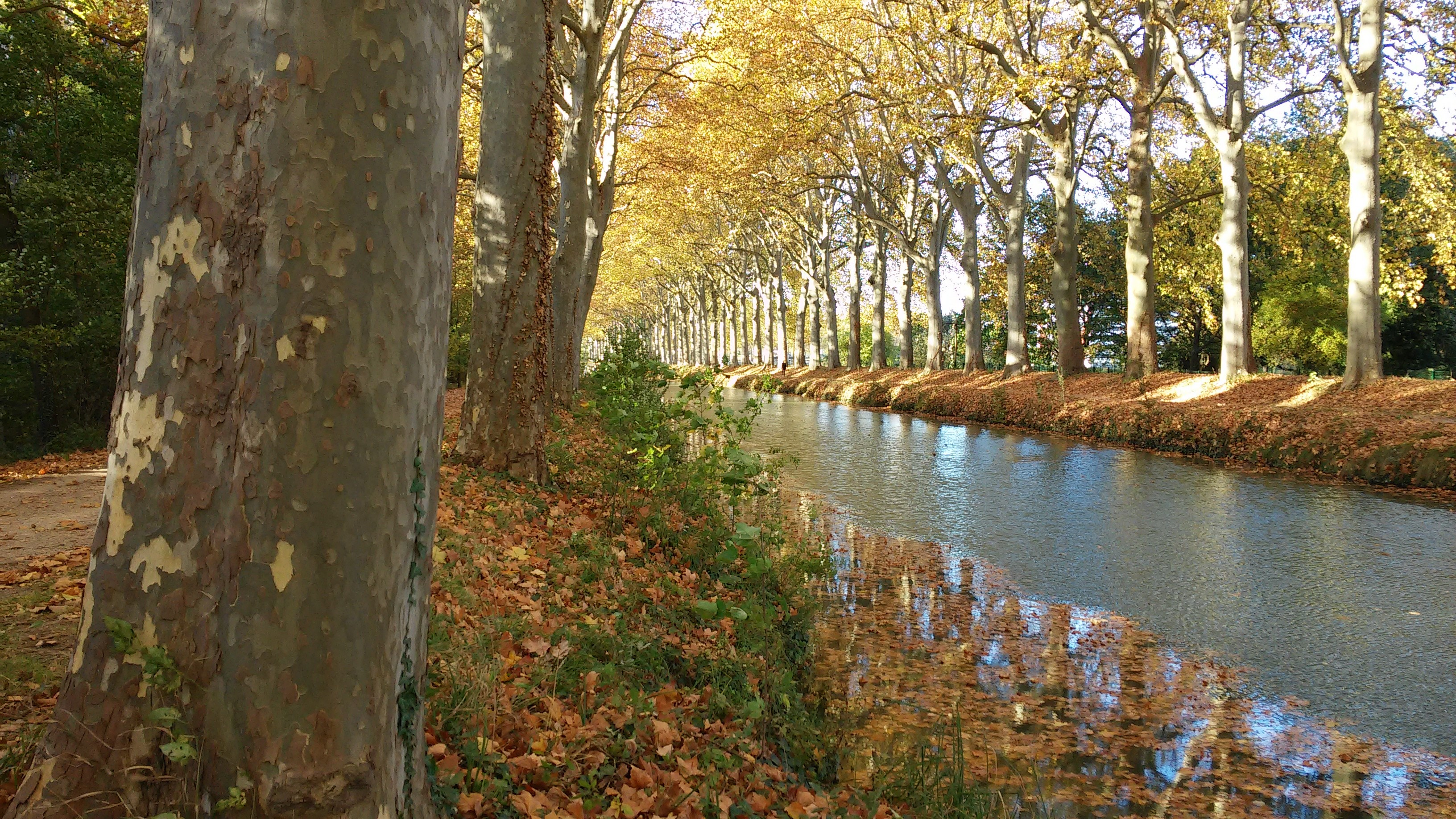 Canal du Midi à Ramonville, automne 2015